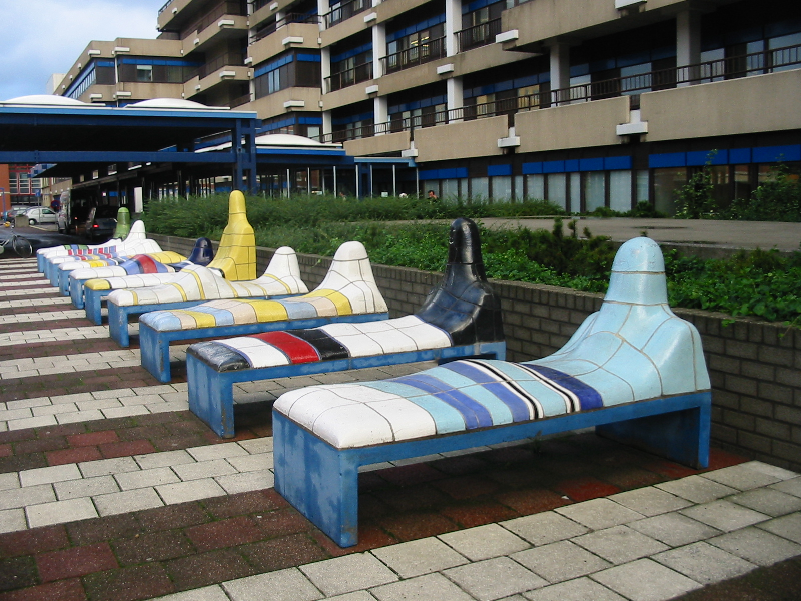 Work of Jan Snoeck Westeinde Ziekenhuis, The Hague, The Netherlands